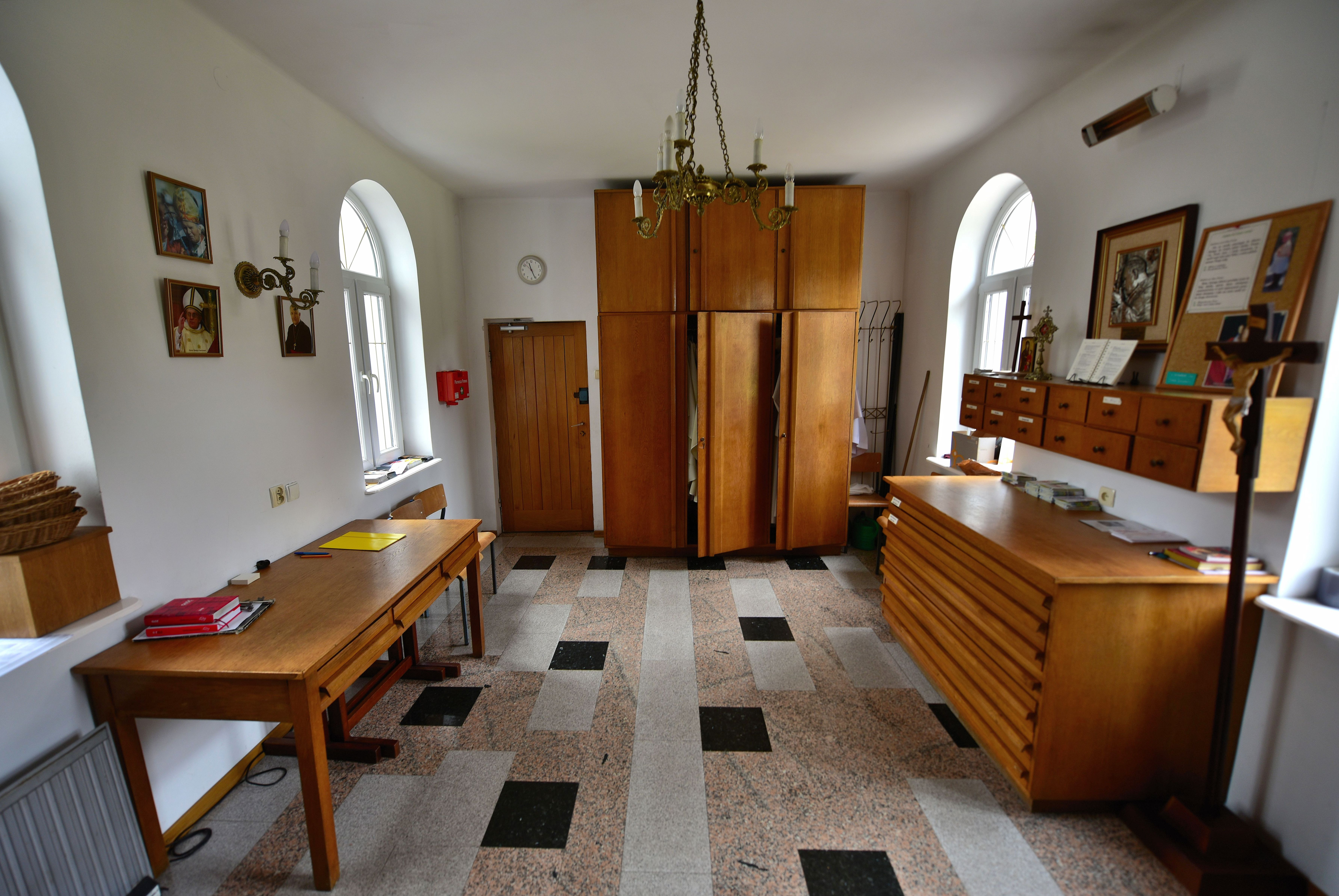 Zakrystia w kościele Opatrzności Bożej w Warszawie (Wesoła)